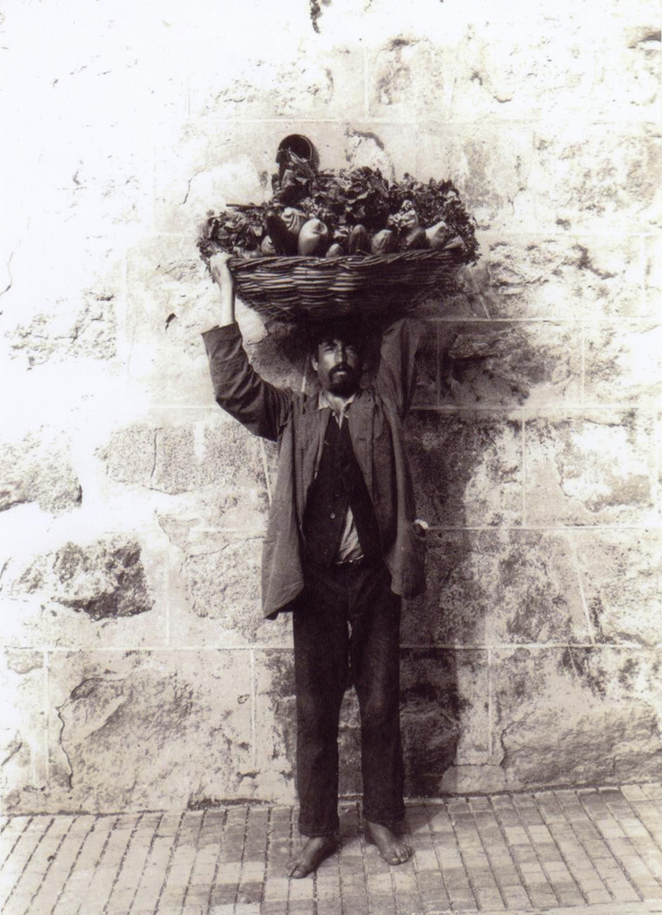 Verdulero de los cerros de Valparaíso (Chile)